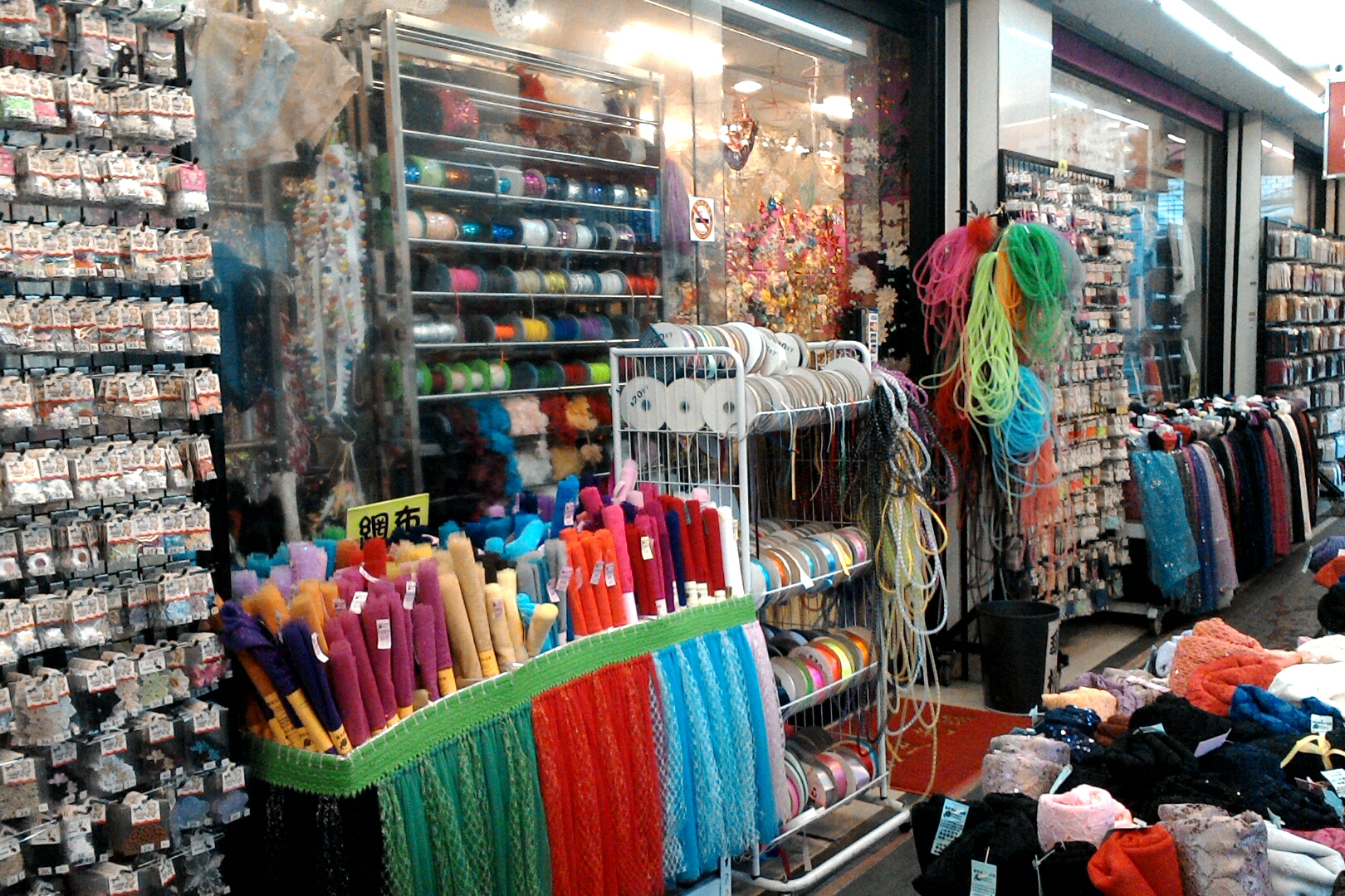 南京西路上的綢布店,台北市大同區延平次分區永樂里